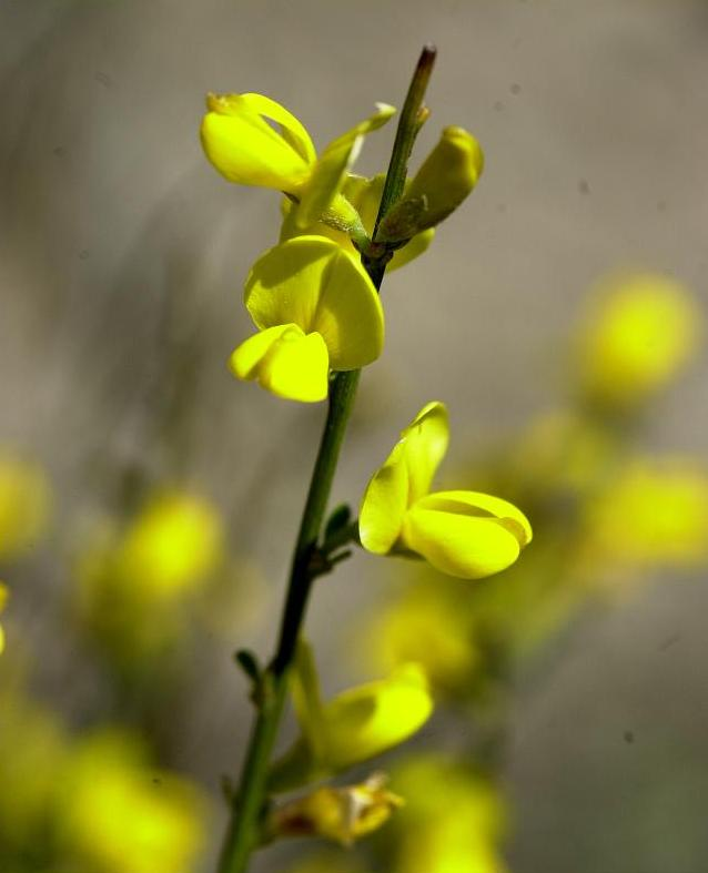 licence GFDL